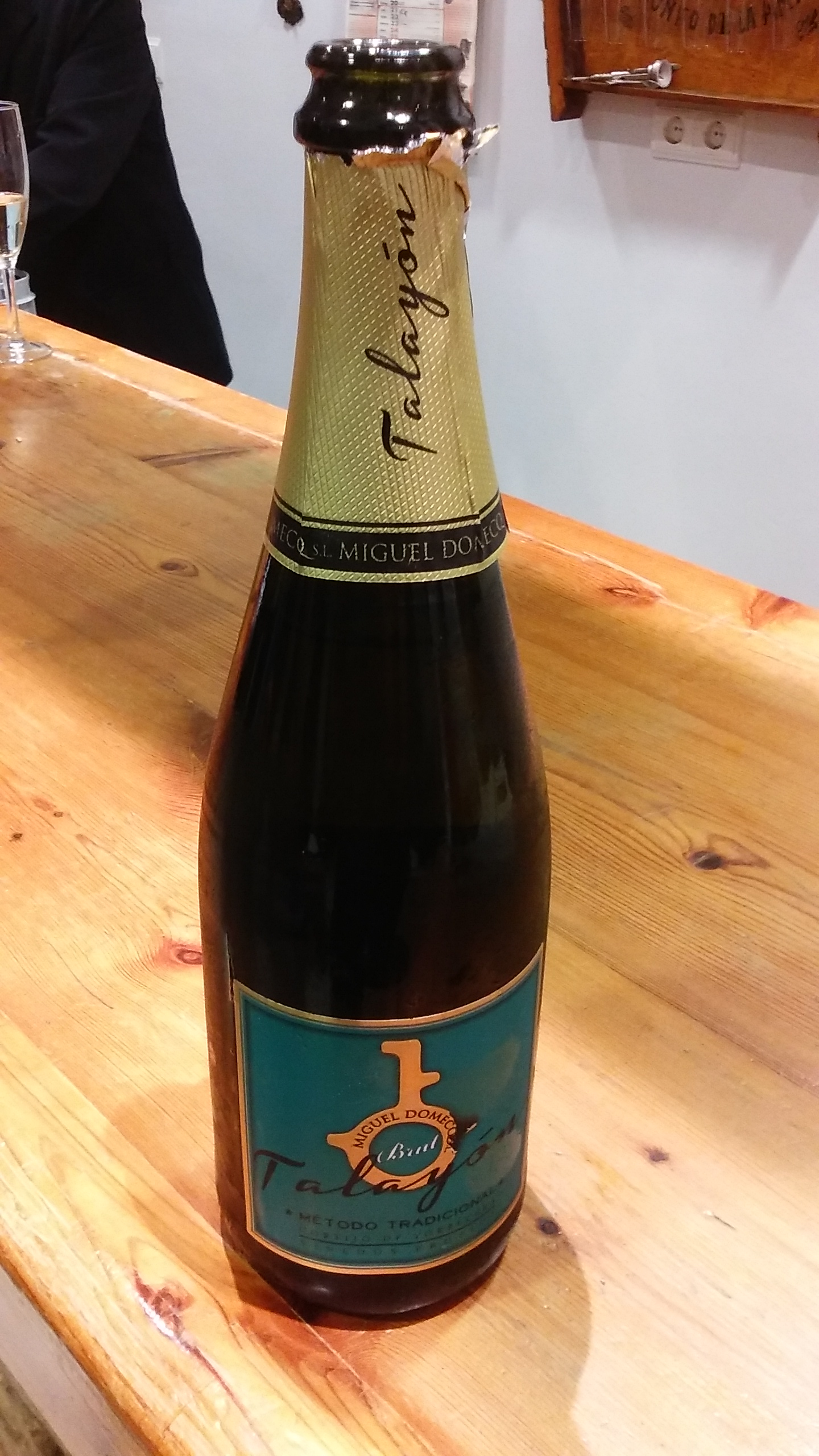 Botella de vino espumoso de Torrecera, Jerez.